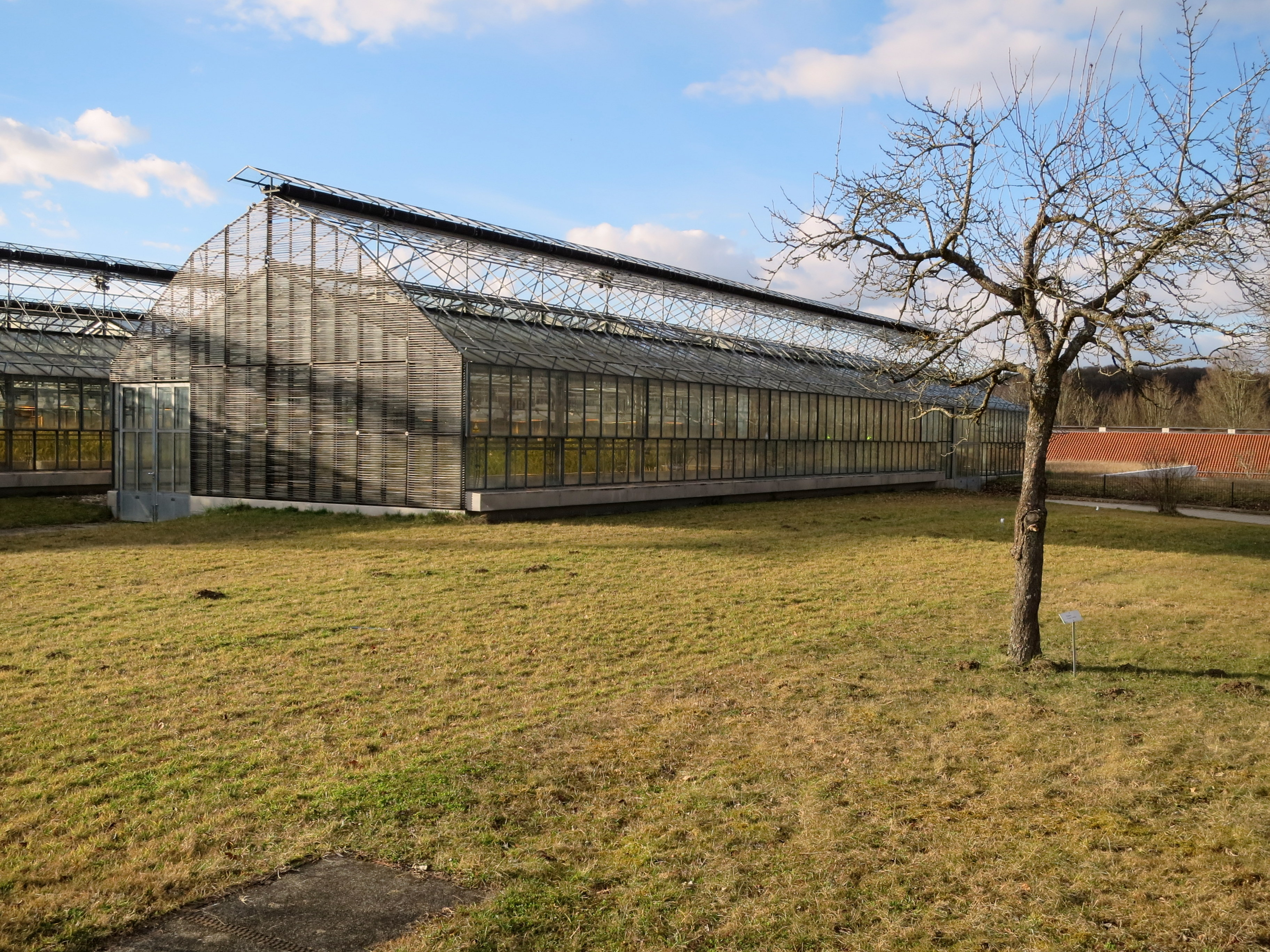 Im Nordteil des Campus Freising-Weihenstephan liegen die Gebäude der LfL